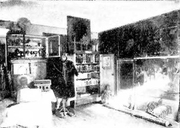 Towarzystwo Muzealne Łemkowszczyzna w Sanoku